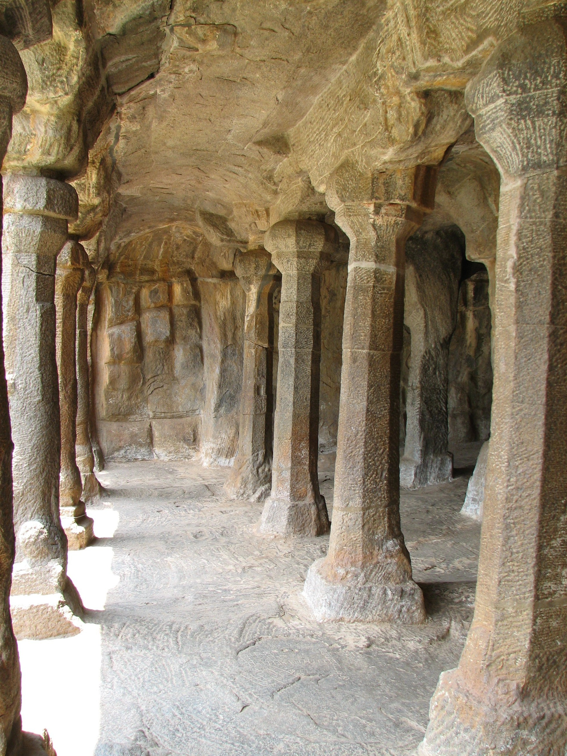 India - Mamallapuram - 022 - Cave pillars